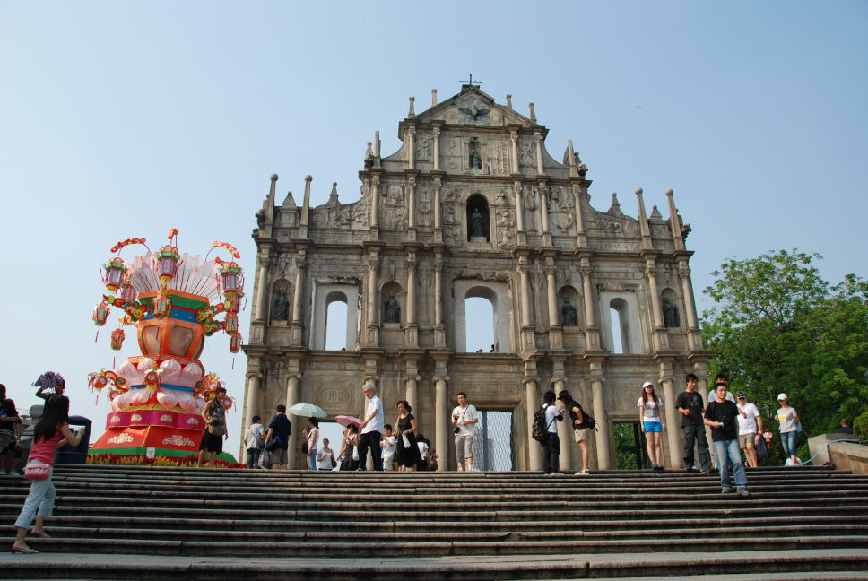 7-9 R. da Ressurreicao, Macau